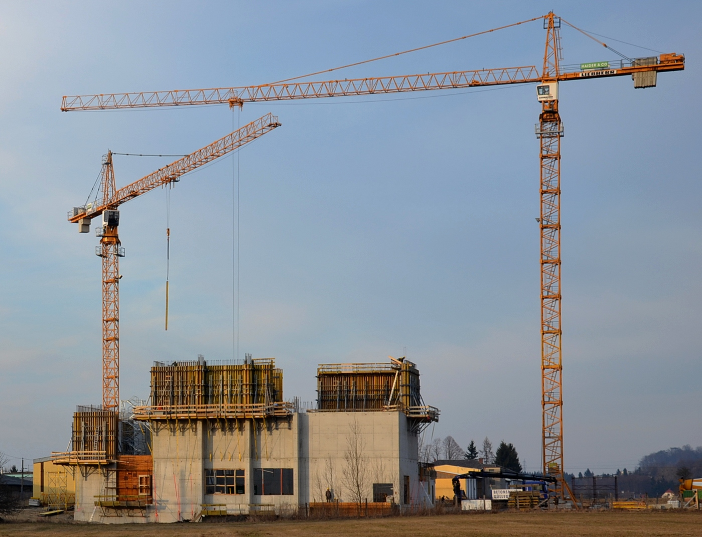 Mit einer Kletterschalung wird das Biomasseheizkraftwerk Steyr errichtet. Die Schalung klettert dabei an der bereits beonierten Wand mit Unterstützung des Krans hoch.